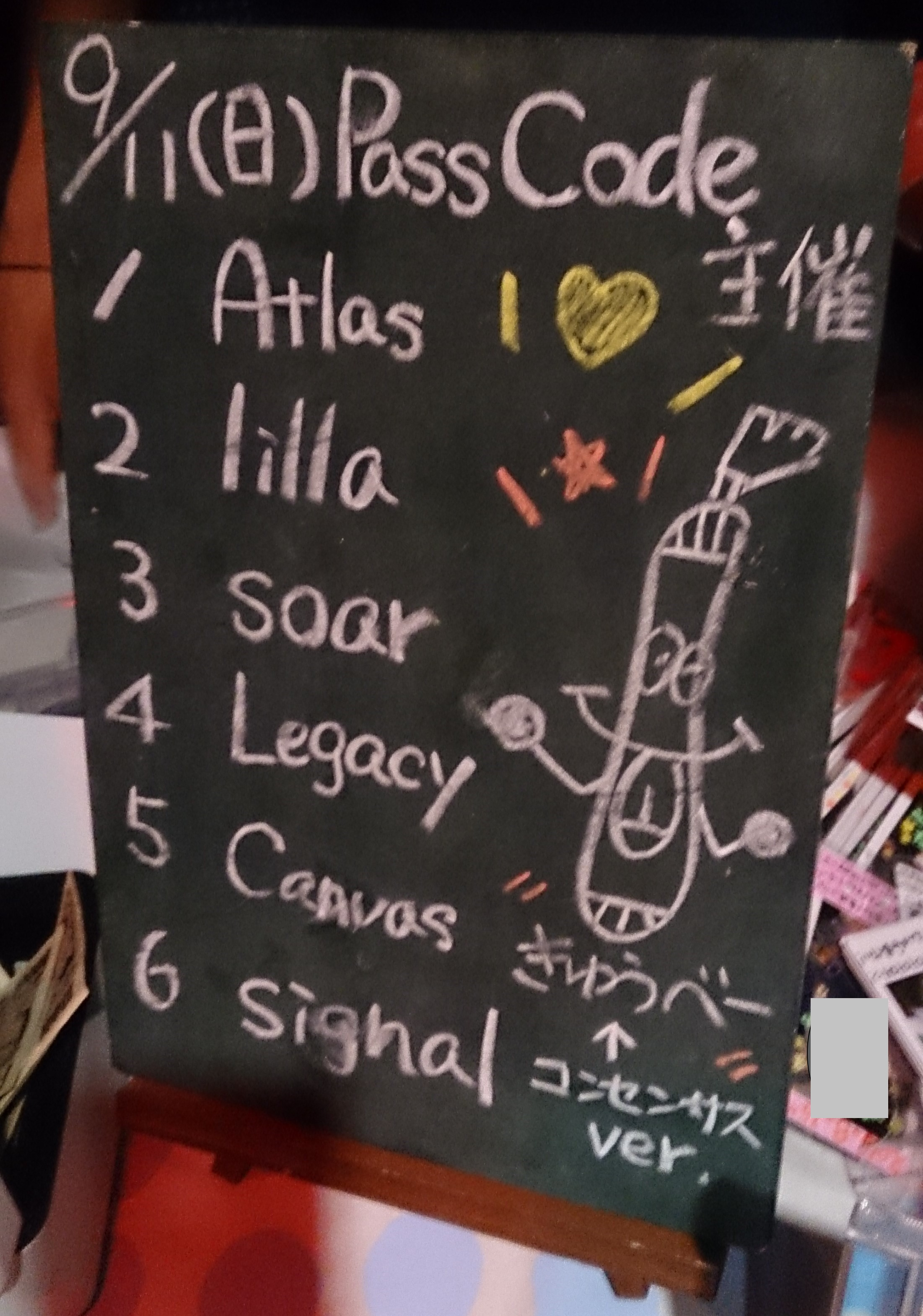 amiinAセトリボード(20160911(1))